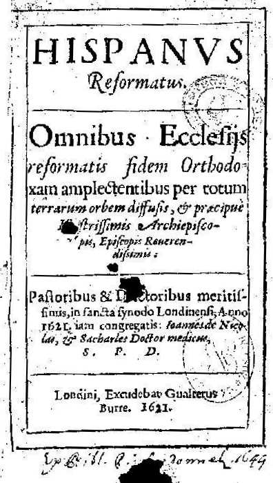 Frontis de Juan de Nicolás y Sacharles, "Hispanus reformatus", Londres, por Walter Burre, 1621. Biblioteca Nacional de España, U/8076.